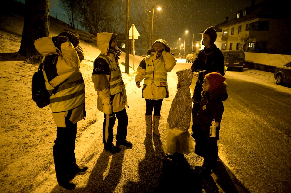 Foto: Tor Erik H. Mathiesen, Nikon D3, Adobe RGB. Foto på oppdrag for Natteravnene, som har alle bilderettigheter.